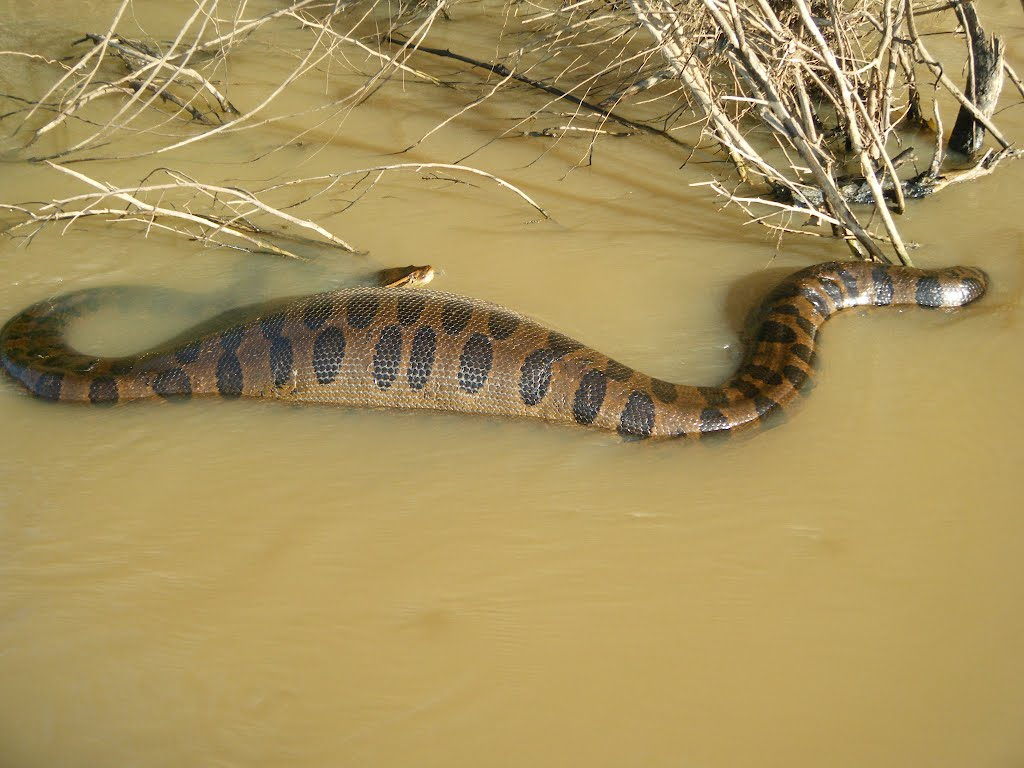 Eunectes murinus no rio Aguapeí. Parque Estadual Aguapeí.